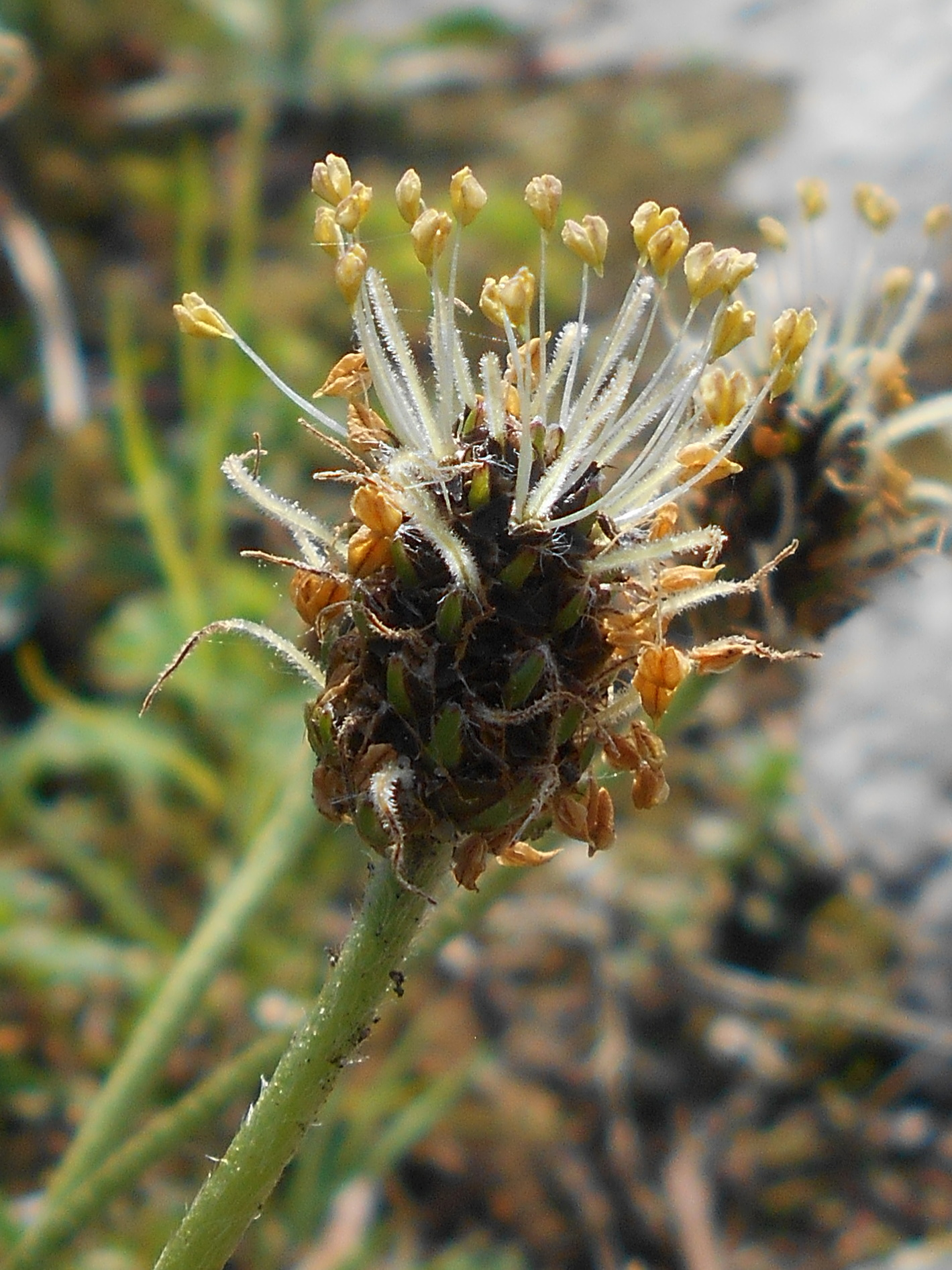 Babka górska (Plantago atrata), Ogród Botaniczny PAN w Warszawie.